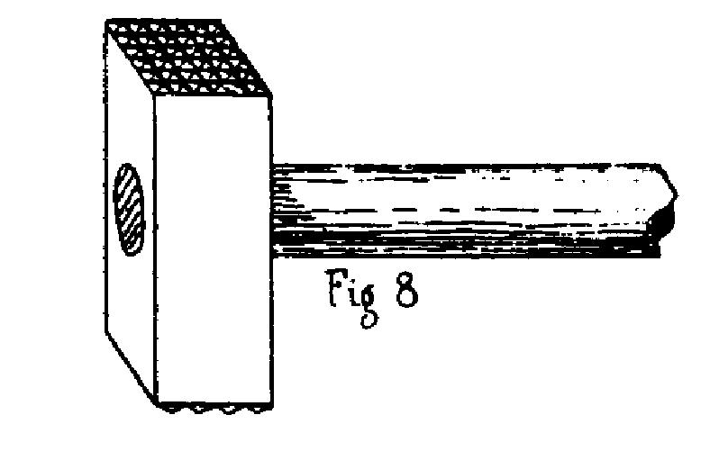 particolare tratto da J. Chaix, Traité de la coupe des pierres, 1890